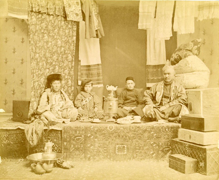 Башкиры в домашнем быту